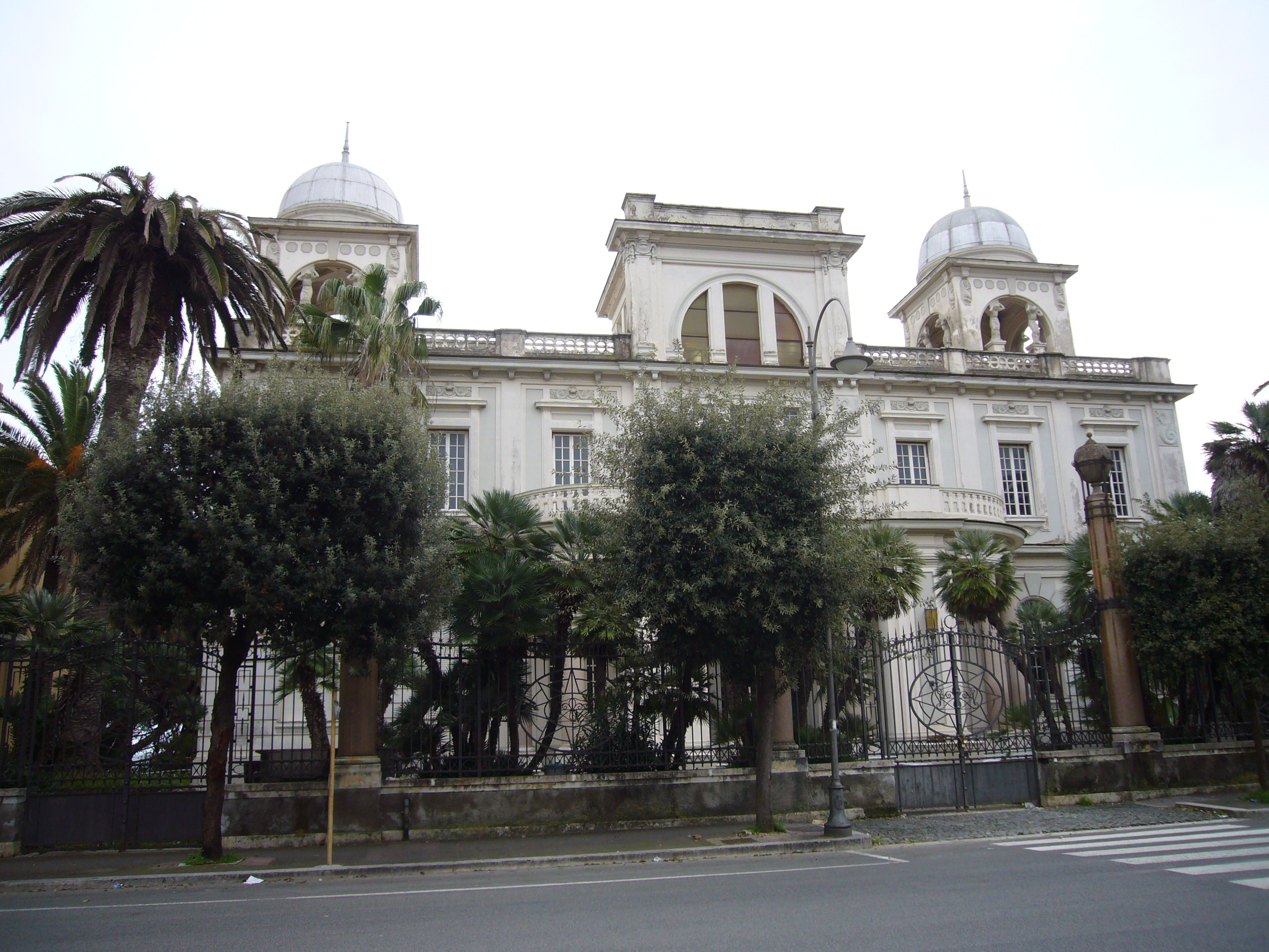 Anzio, Casino detto "Il Paradiso del mare" (1924, architetto Cesare Bazzani)